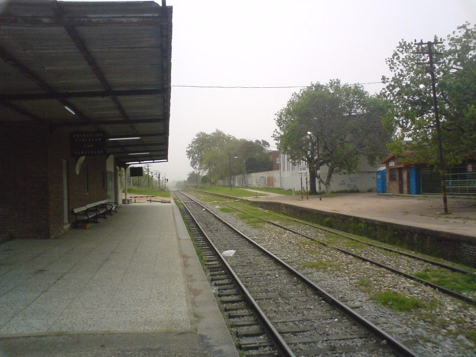 Estación de Trenes de Sayago (Montevideo-Uruguay)